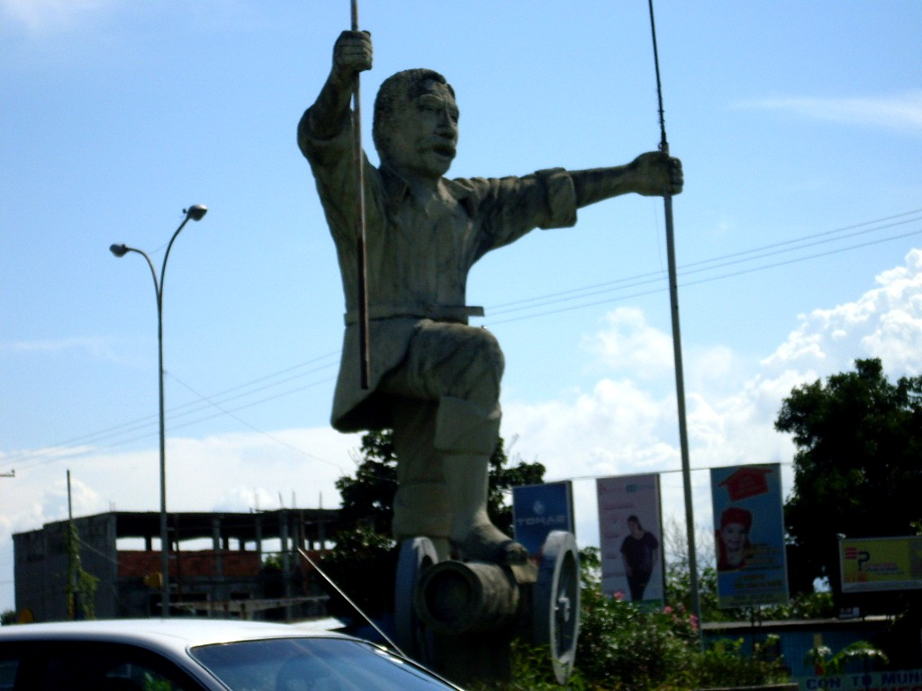 Acarigua, estado Portuguesa - Venezuela (2010)